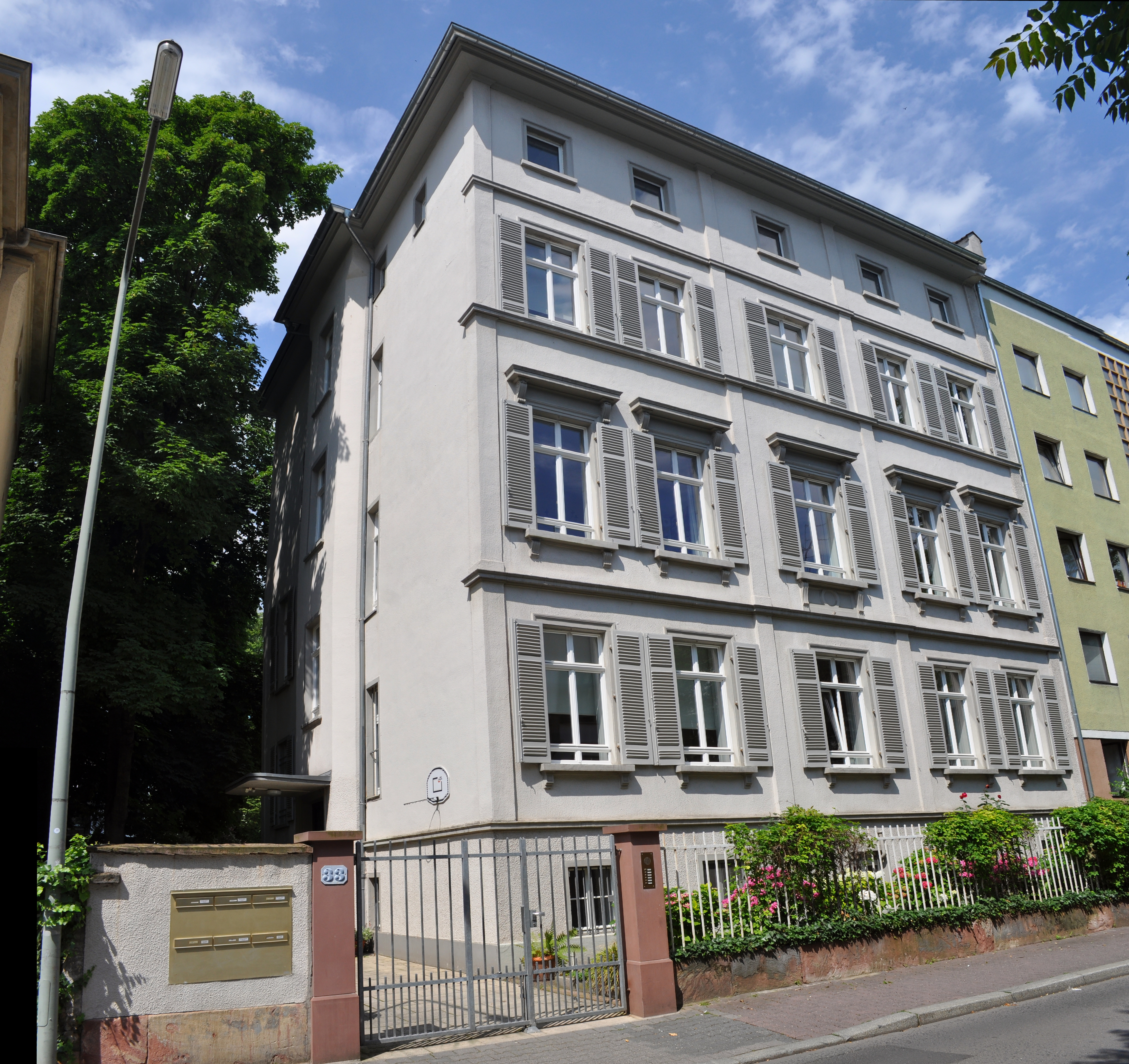 Frankfurt, im Trutz 33